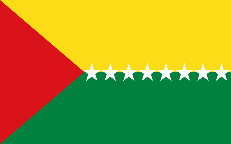 Bandera del Cantón Sucumbíos